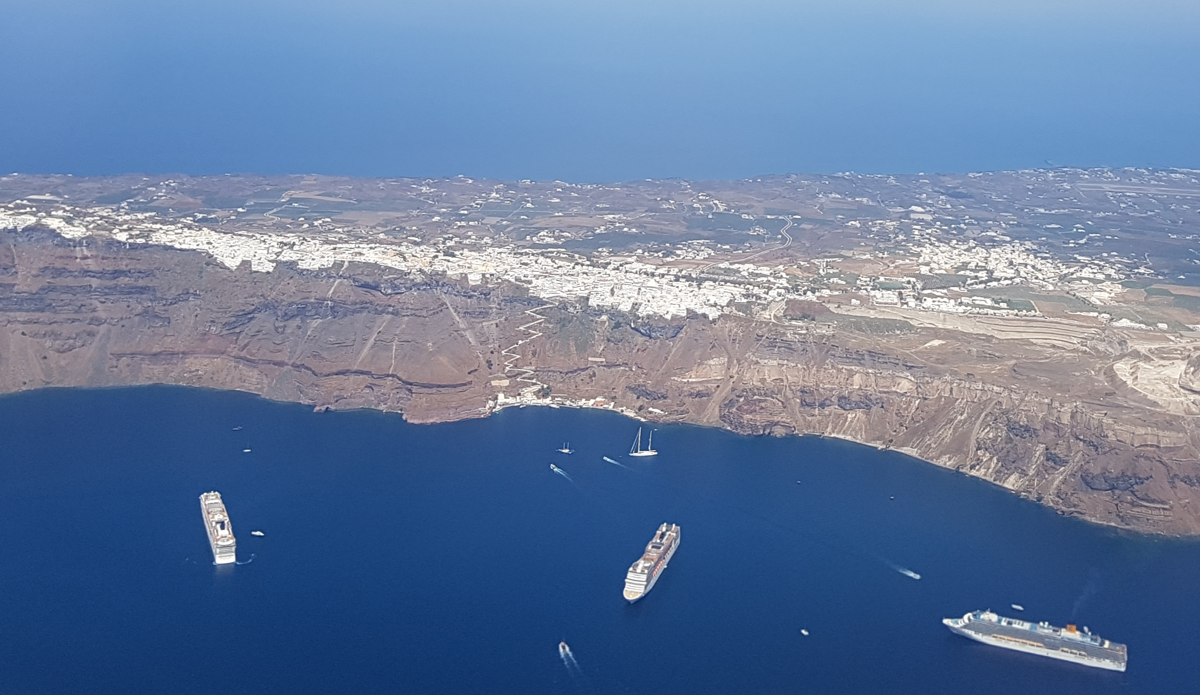 Kreuzfahrtschiffe in der Bucht vor Fira